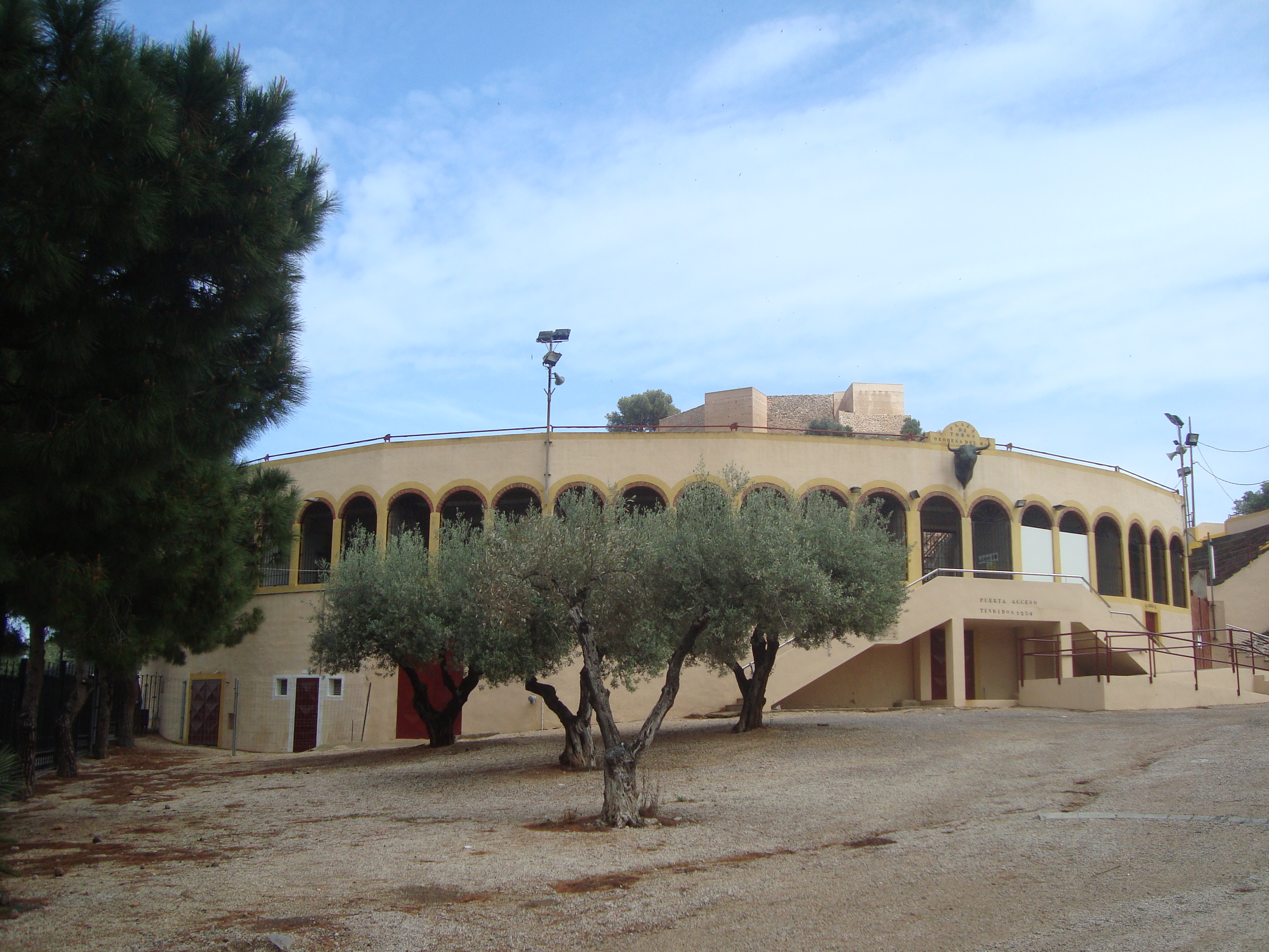 Plaza de Toros de Oropesa del Mar/Orpesa